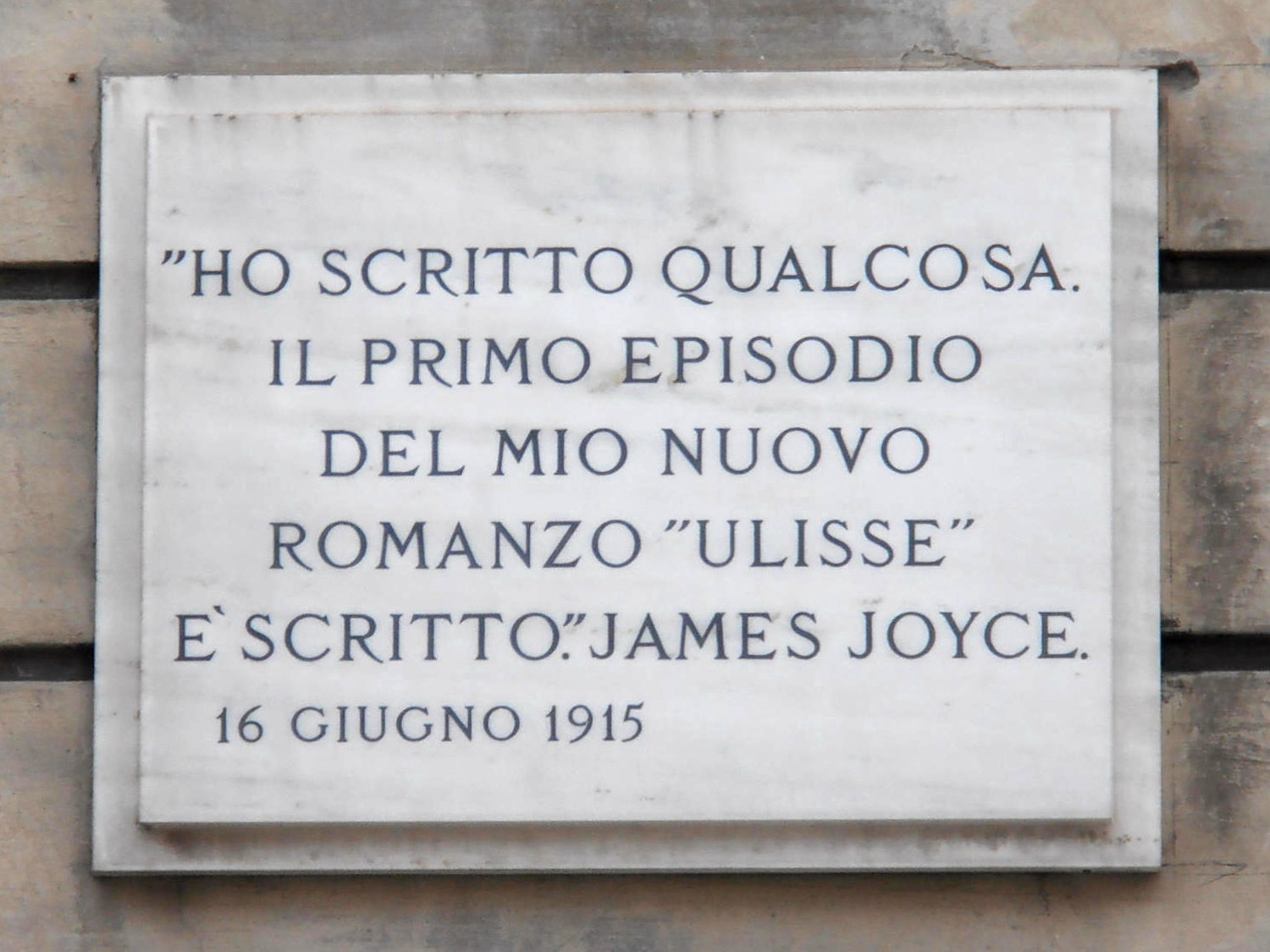 Italy - Trieste - La targa che ricorda l'inizo della scrittura dell'Ulisse di James Joyce